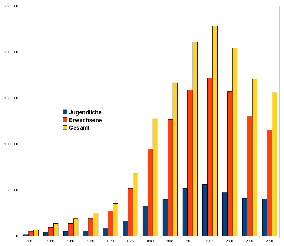 DTB Mitgleiderentwicklung (1950-2010, 5-Jahresschritte)